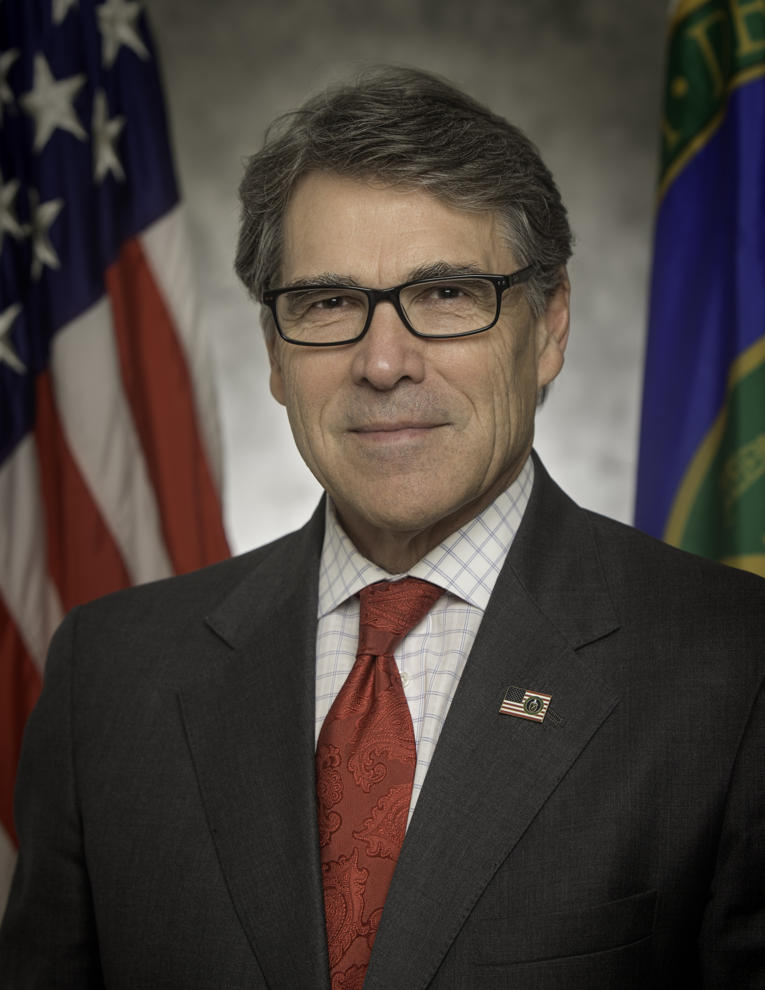 Secretary Rick Perry Official DOE Portrait